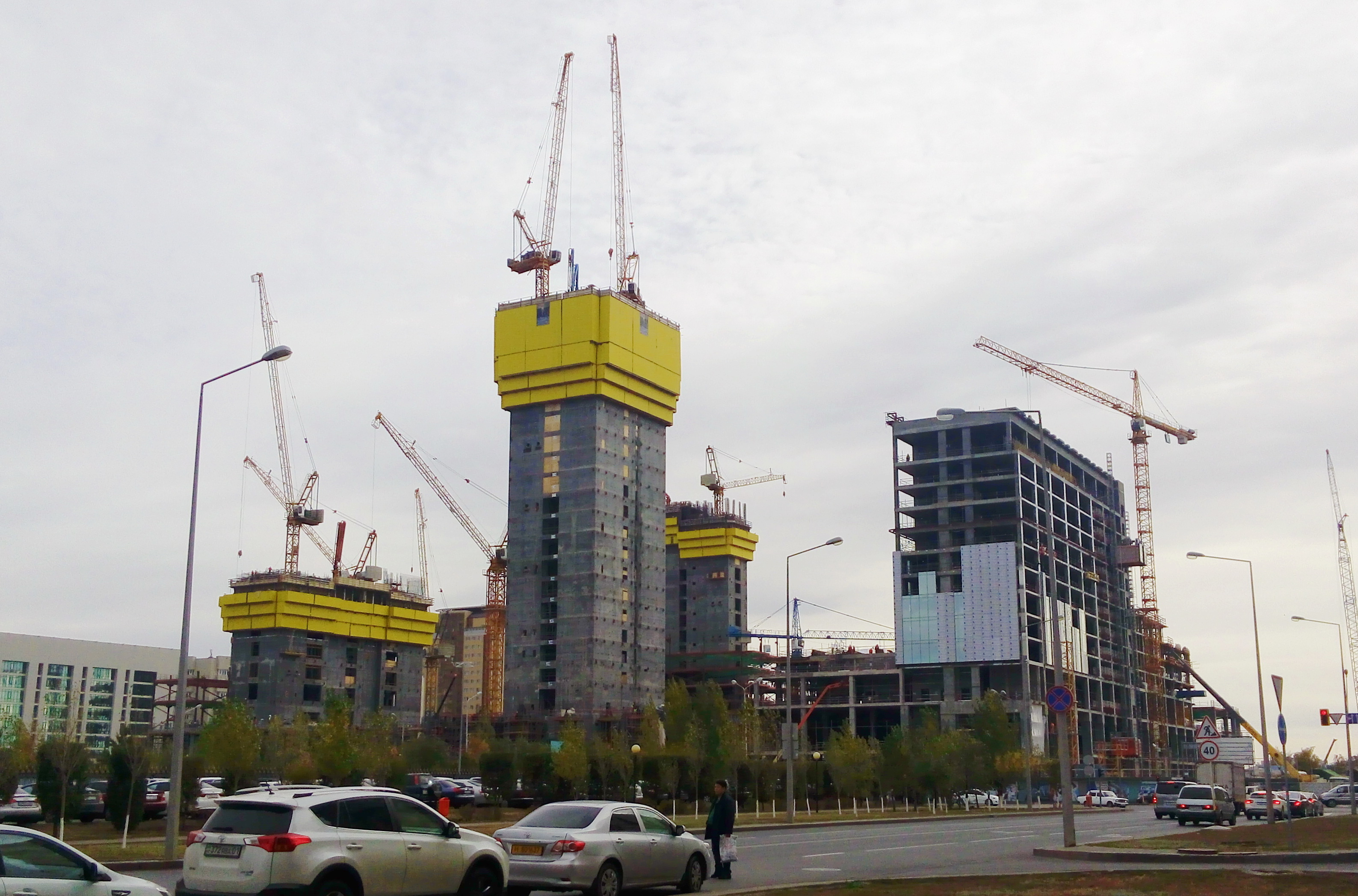 Abu Dhabi Plaza, 6 октября 2015 года